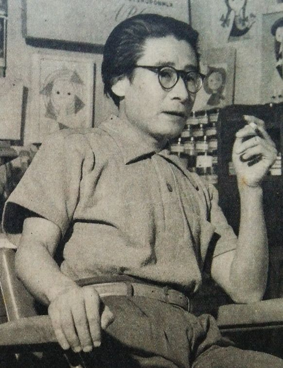 大橋正